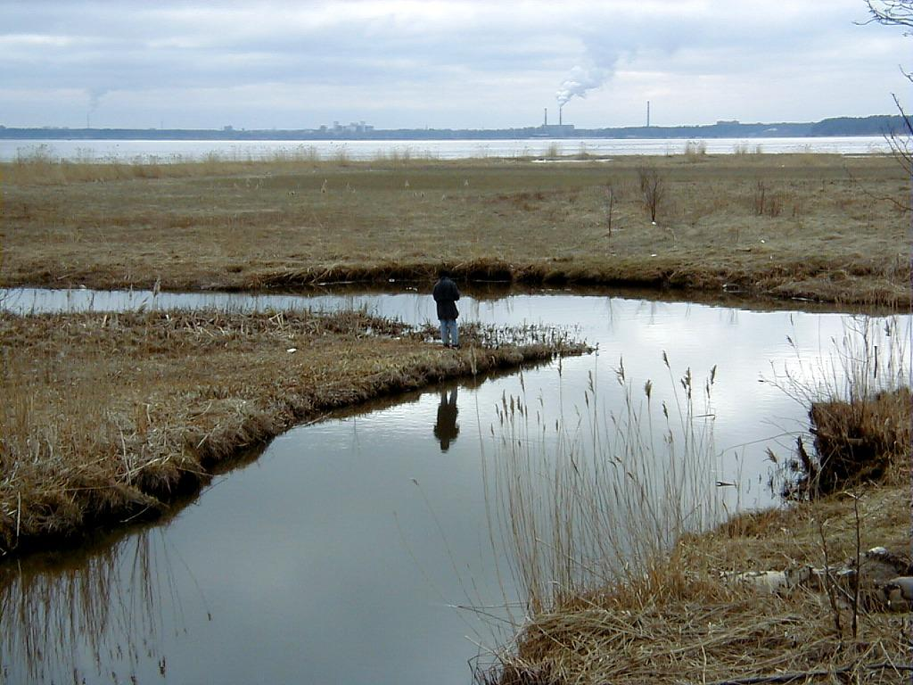 Langa pie ietekas Ķīšezerā 2000-04-09